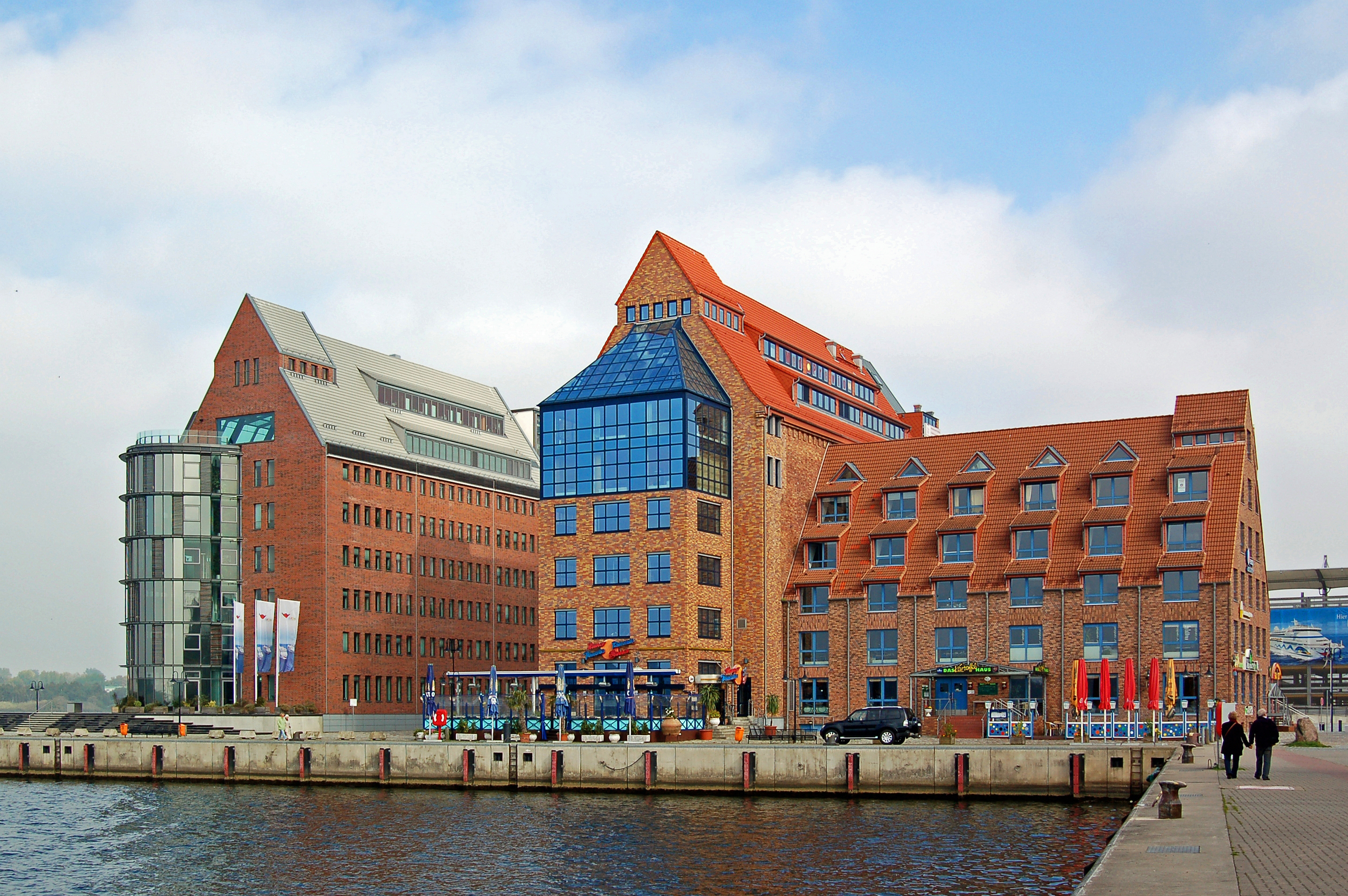 Das Gebiet um den Stadthafen wurde seit 1991 zu einer Art »Bummelmeile« mit Restarants, Theatern, Einzelhandel usw. umgebaut. Die alten Speicher (1935 erbaut) wurden zu Büro- und Geschäftsbauten umgebaut und erstrahlen in neuem Glanz. Namhafte Unternehmen haben hier ihren Firmensitz. Die alten Hafenanlagen wurden abgebaut. Zusammen mit dem Hafen Warnemünde findet hier jährlich die »Hansesail«, quasi das Gegenstück zur »Kieler Woche« statt.